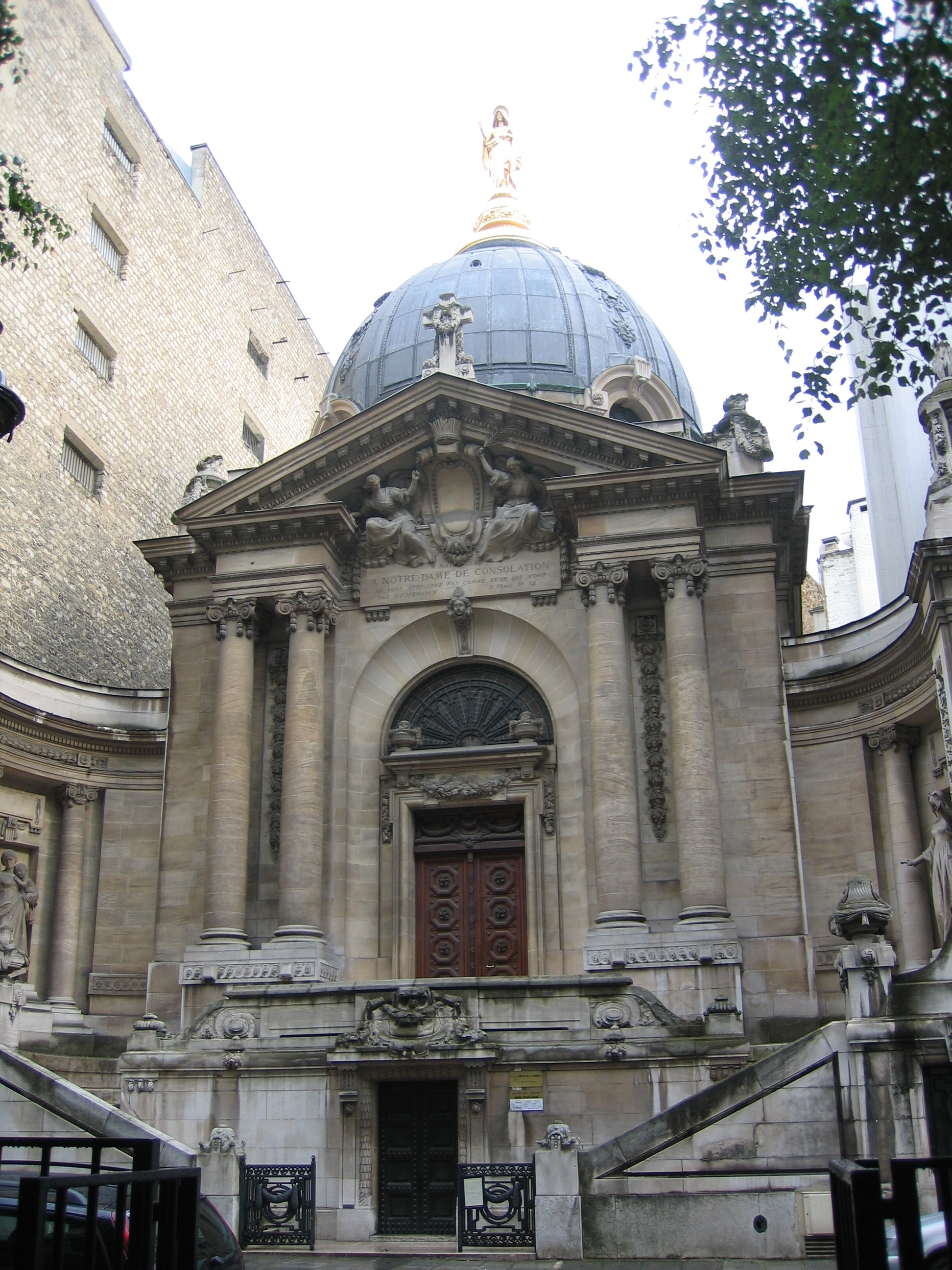 Chapelle Notre-Dame de Consolation, mémorial du Bazar de la Charité, Paris 8e